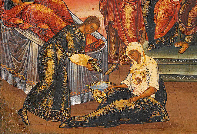 Икона "Рождество Богородицы". Россия, XIX. Поволжье середина XIX в.-Дерево левкас темпера.31 x 265-см. Фрагмент